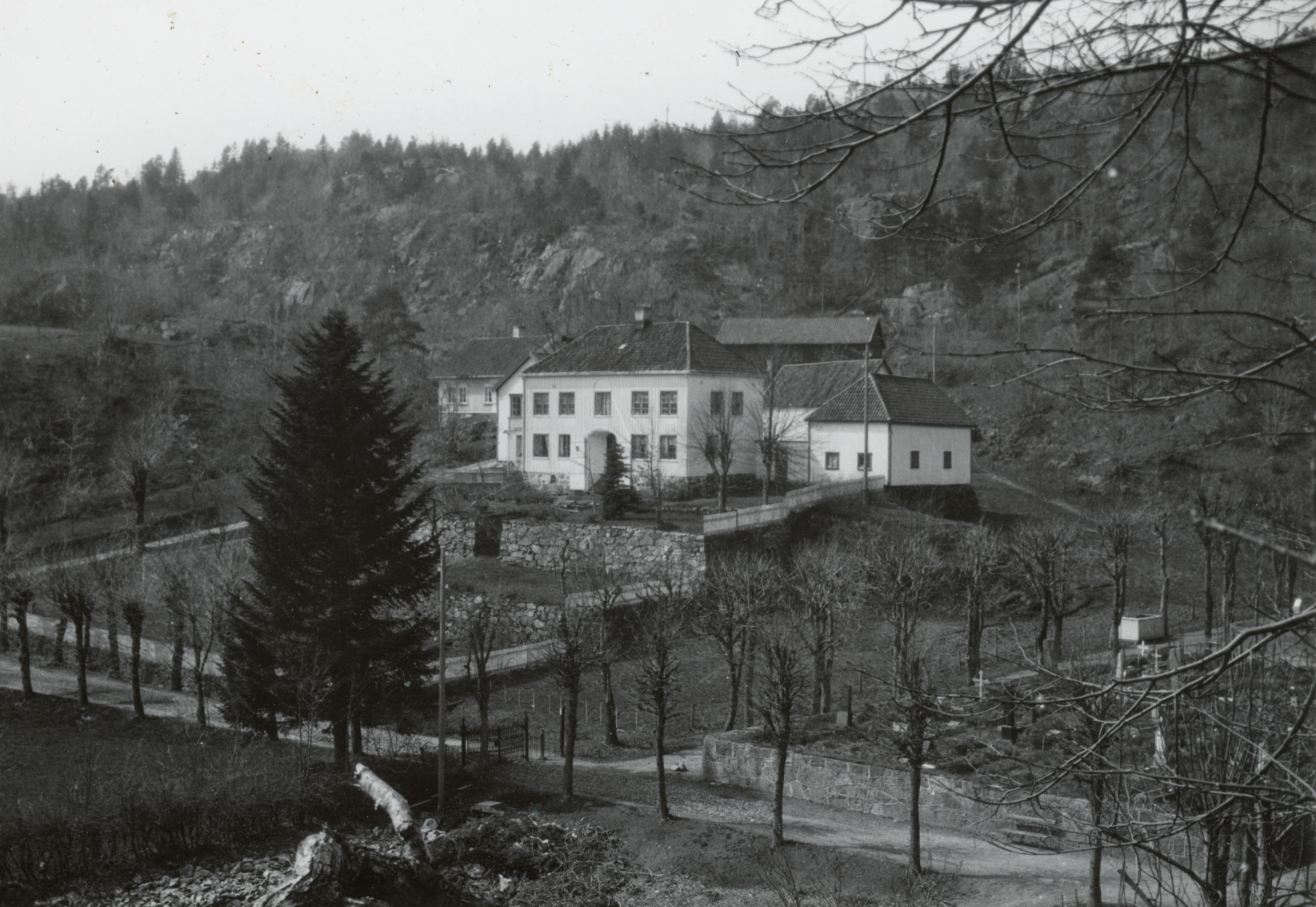 Haugedal, Høgedal, Aust-Agder Oversikt This image on crowdsourcing geotagging platform Fotodugnad